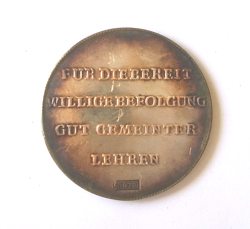 Kleetaler des Grafen Franz I. von Erbach-Erbach, 1793, Revers, Nachprägung 1978